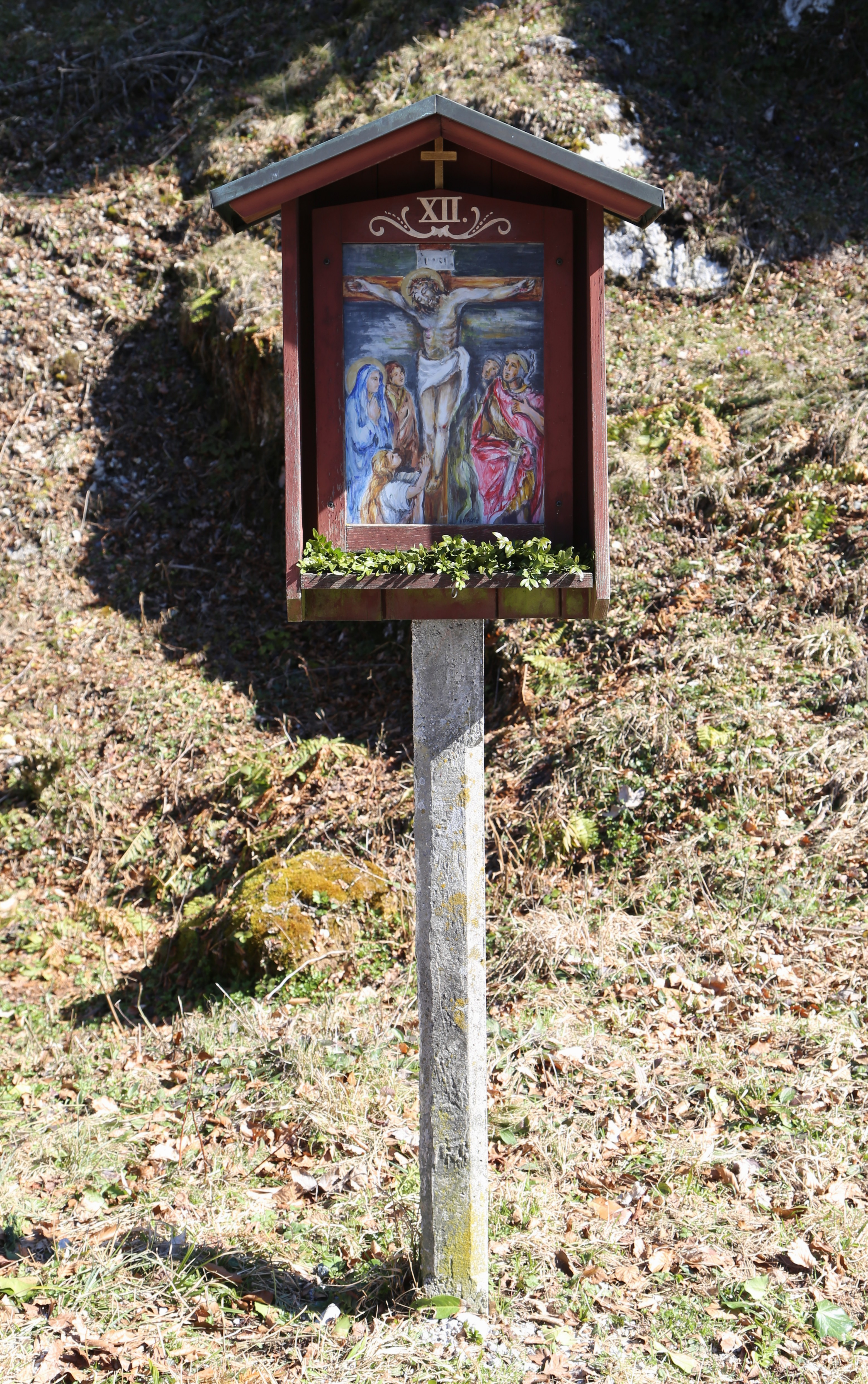 Thierberg, Kufstein; Kreuzweg von Neuhaus zur Thierbergkapelle